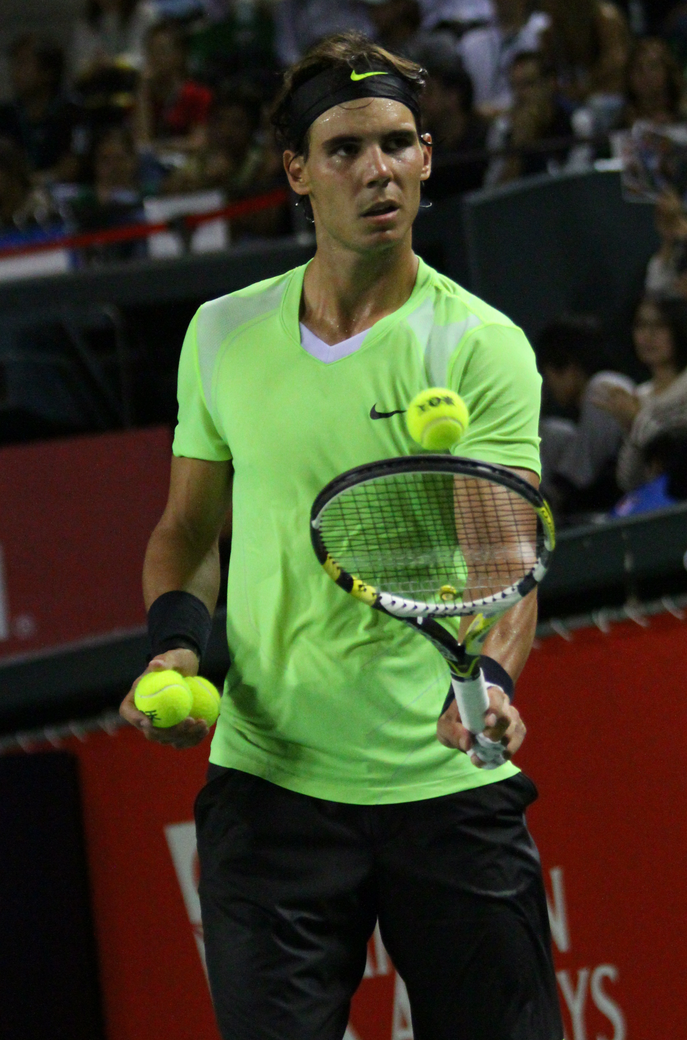 Rafael Nadal, en el torneo ATP de Tokio 2010.